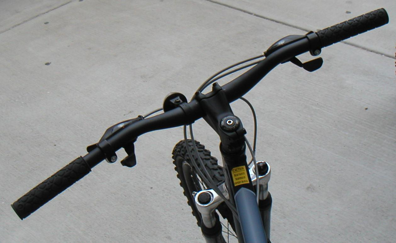 Taken by Andrew Dressel